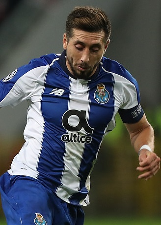 Héctor Herrera con el Oporto en 2018.